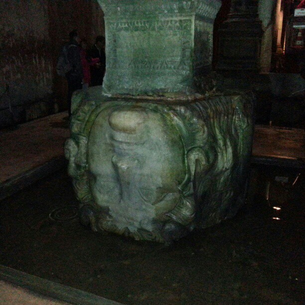 Yerebatan Sarnıcı'ndaki Medusa'lardan biri.